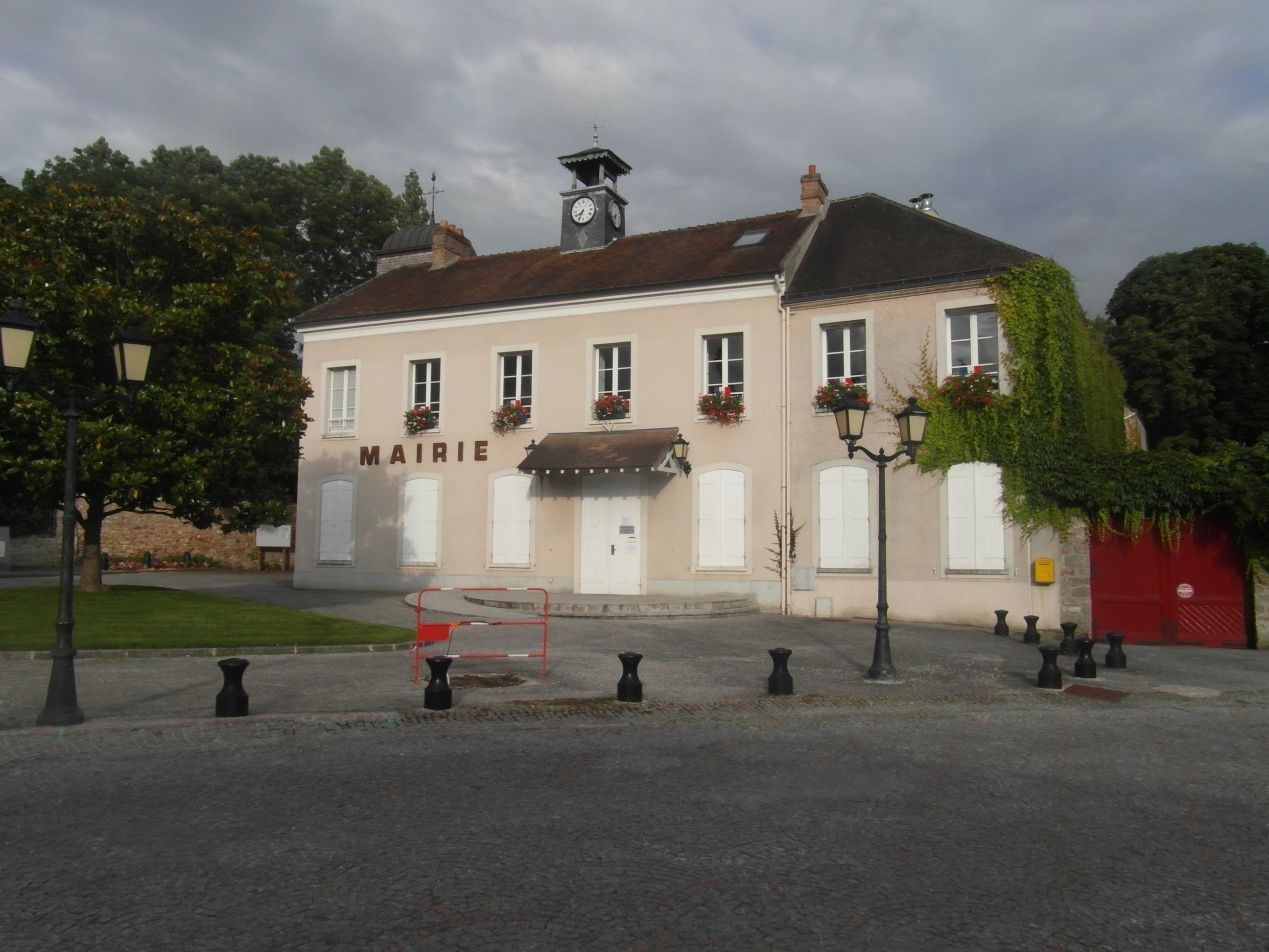 Mairie de Nandy (Seine-et-Marne)